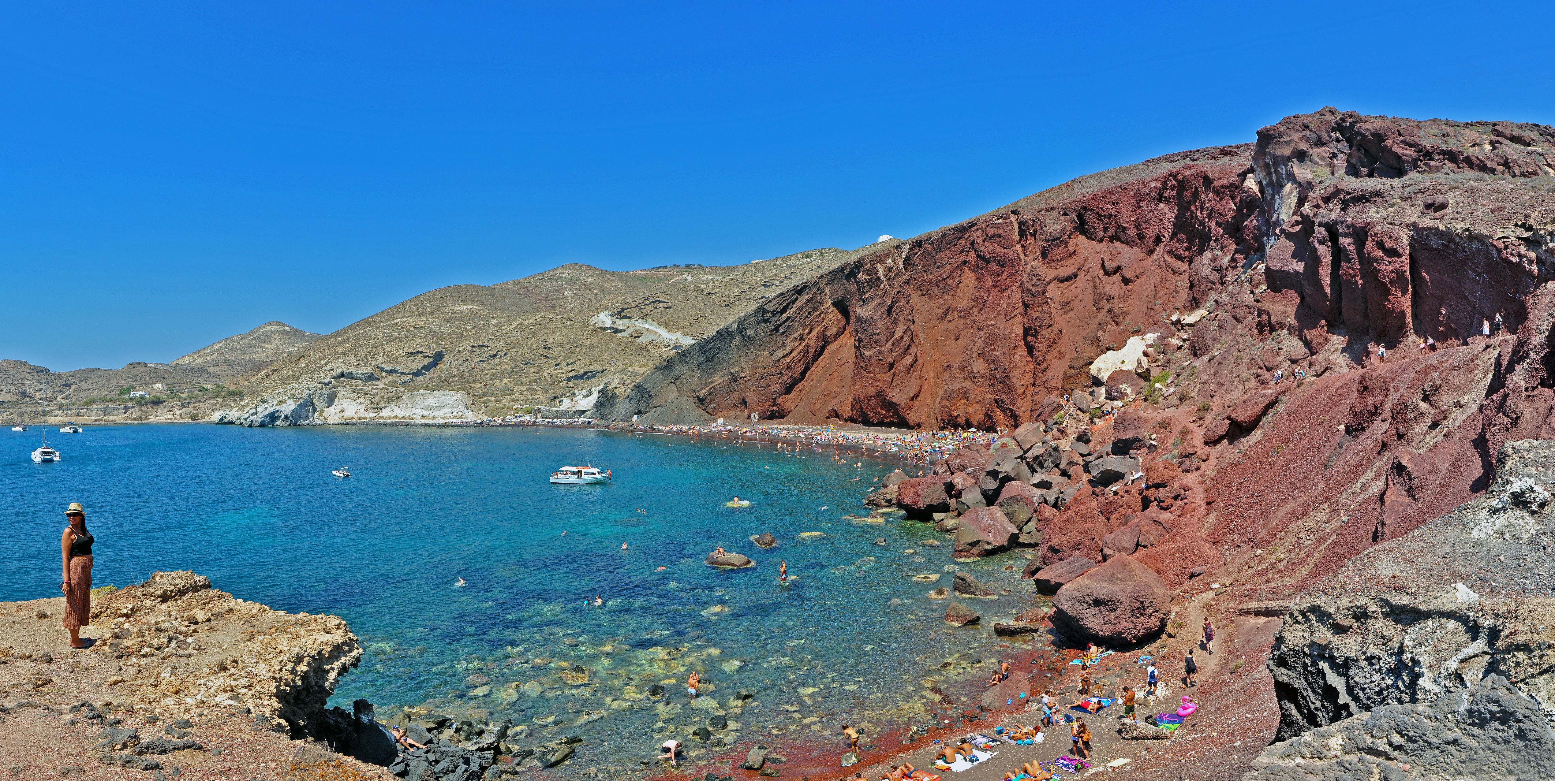 Red Beach, Santorini, Grecia, agosto 2018